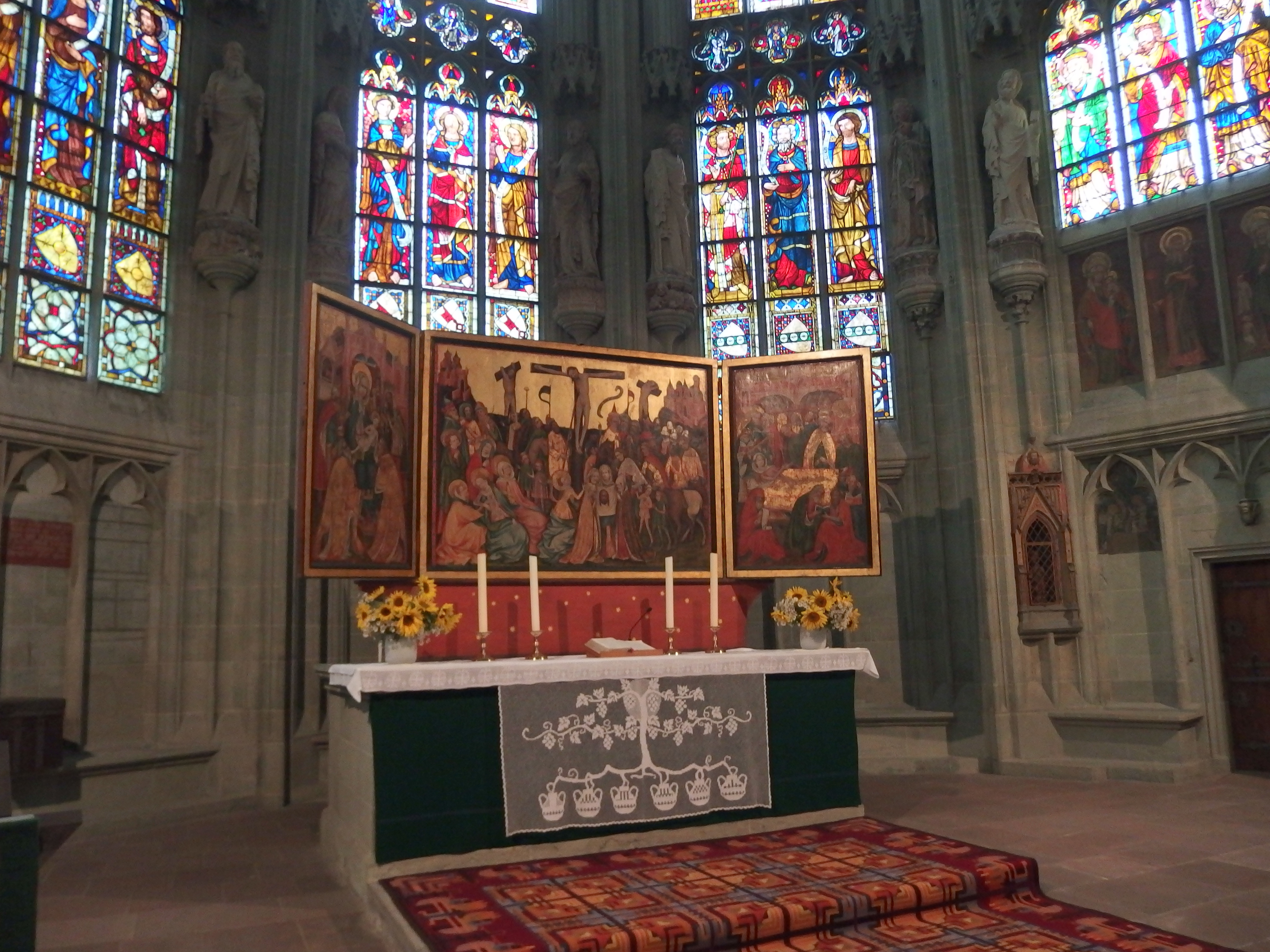 Soest, Kirche St. Maria zur Wiese.